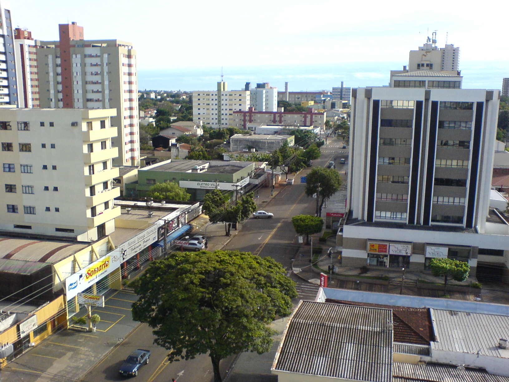 Rua Maringá, vista do Edifício Aquarela